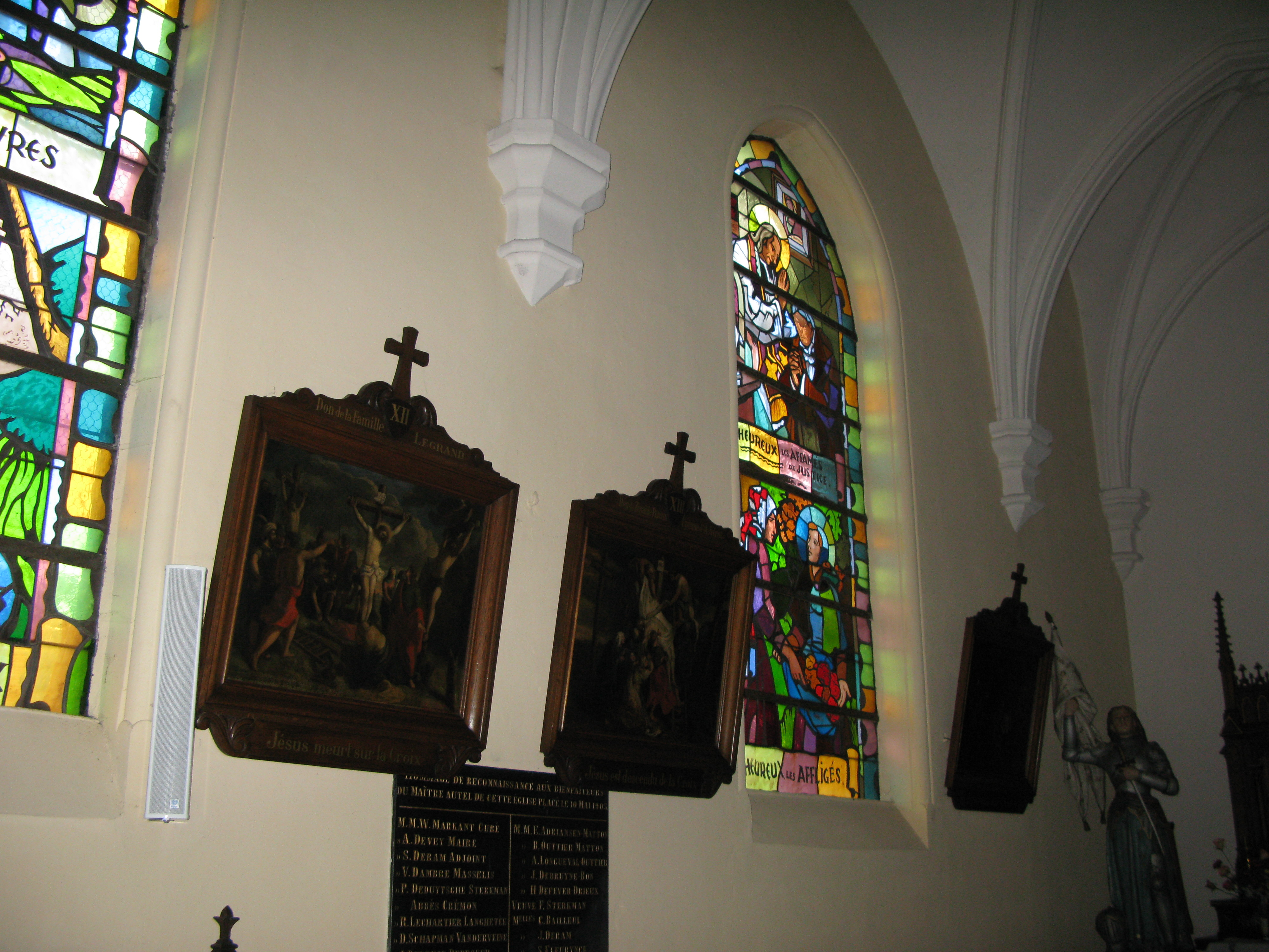 Eglise Saint-Omer de Brouckerque, mur nord, vitraux et tableaux représentant le chemin de croix.